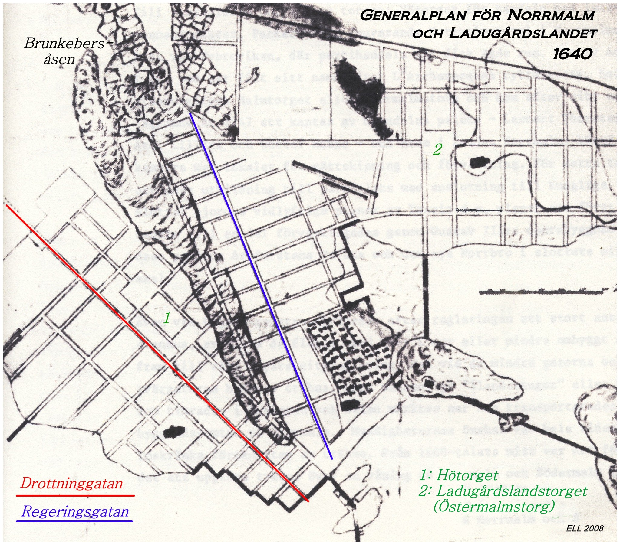 Generalplan för Norrmalm och Ladugårdslandet 1640. Förklaringar har lagds in av Holger Ellgaard